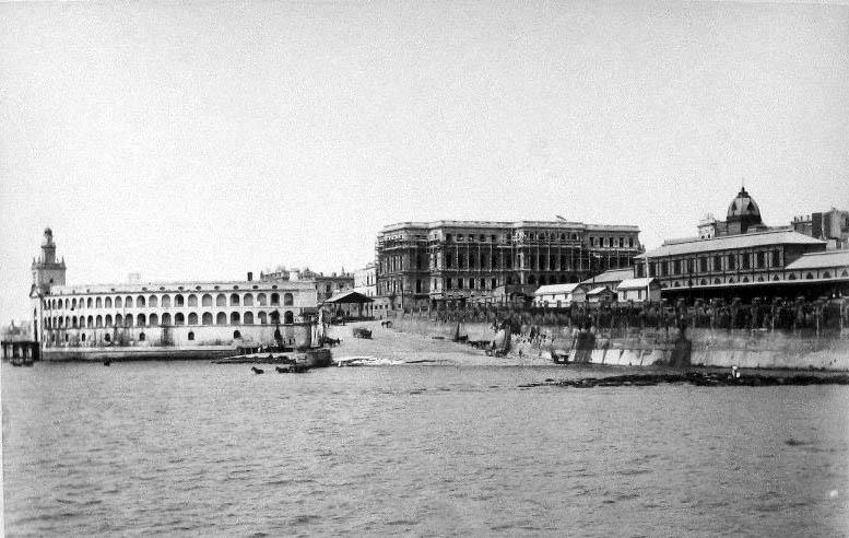 Vista desde el Río de la Plata de la Aduana Nueva o Taylor, la Casa Rosada y la Estación Central.